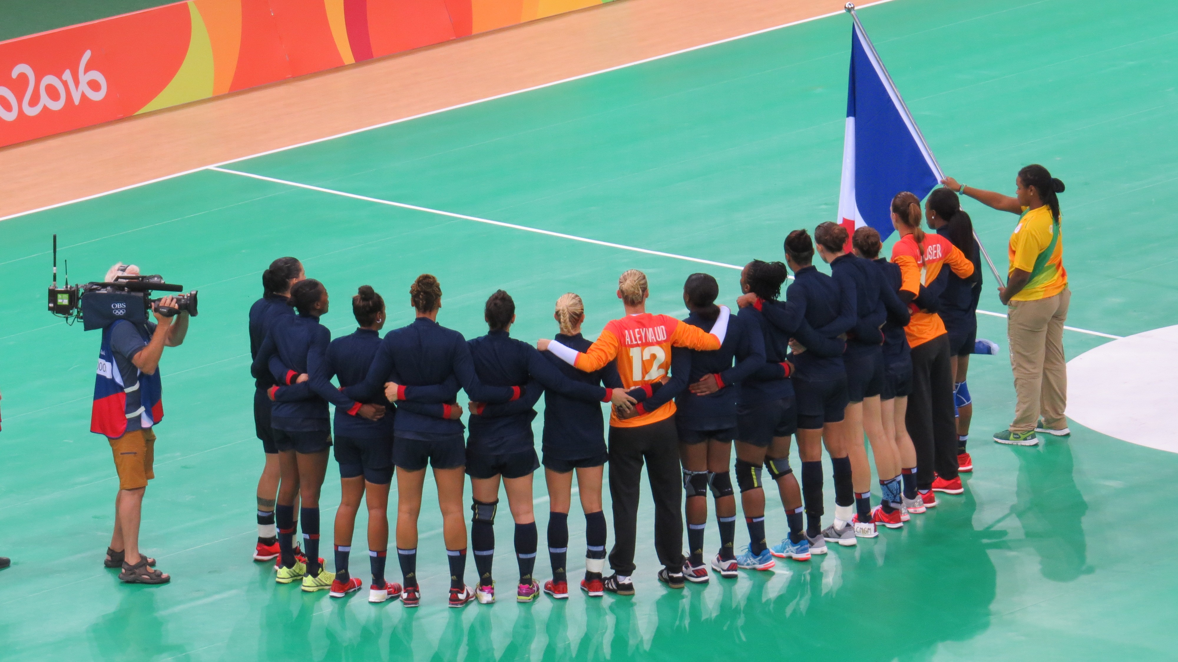 Rio 2016. sx 91